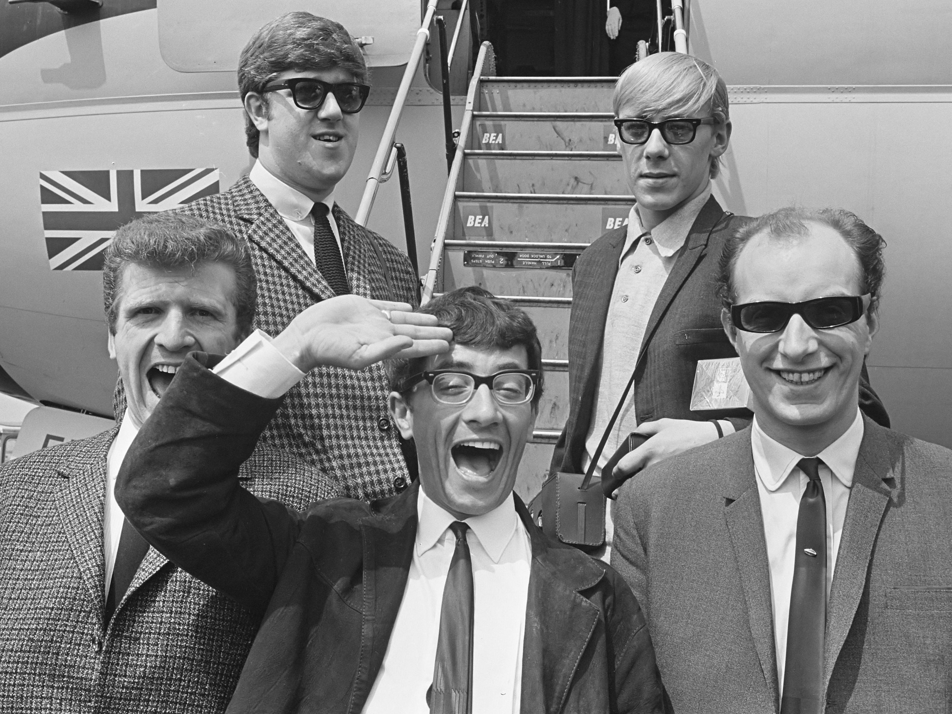 Aankomst op Schiphol van tieneridool Freddie in gezelschap van The Dreamers 26 mei 1964